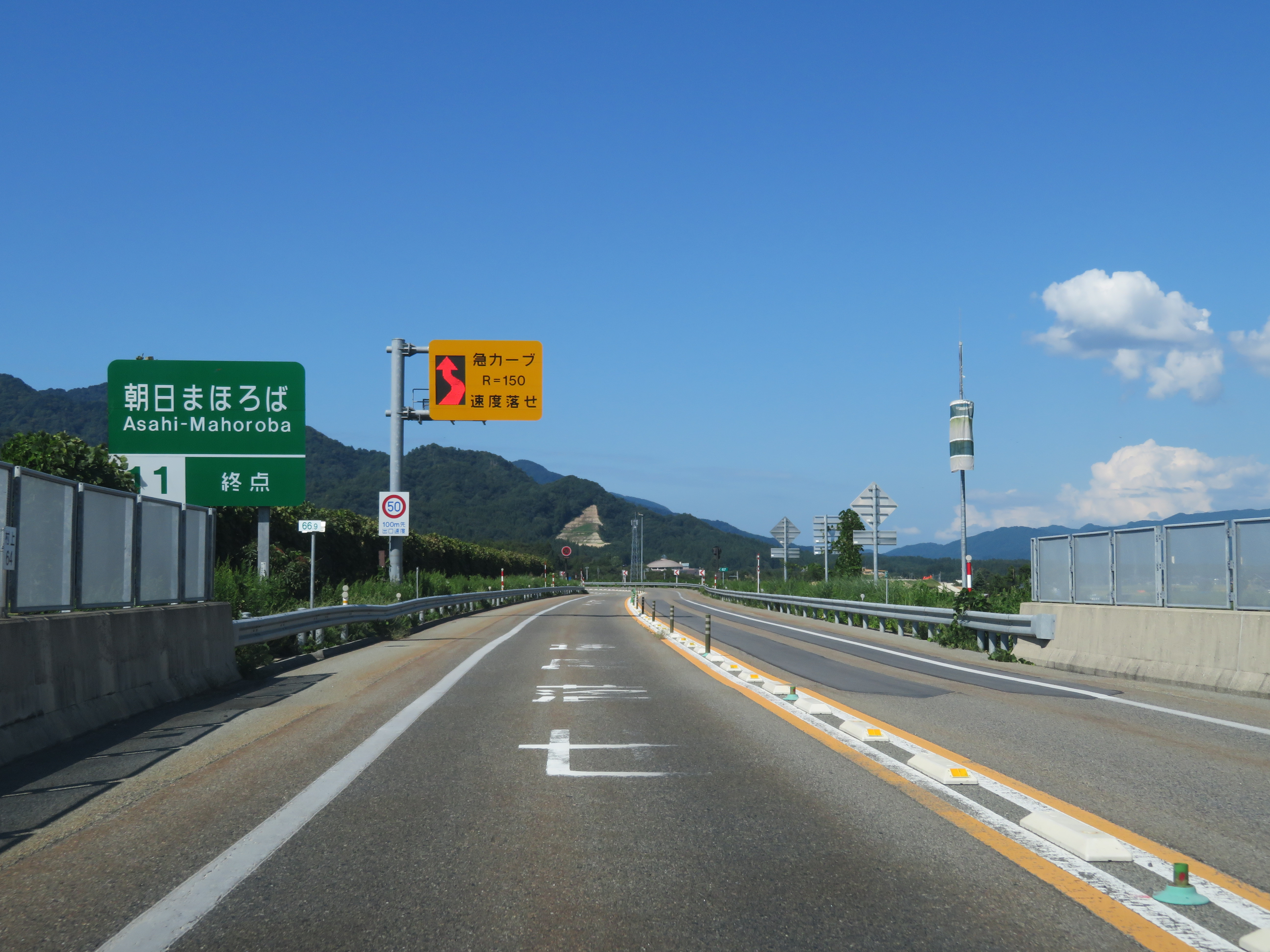 日本海東北自動車道 朝日まほろばインターチェンジ出口付近（新潟方面側から撮影）